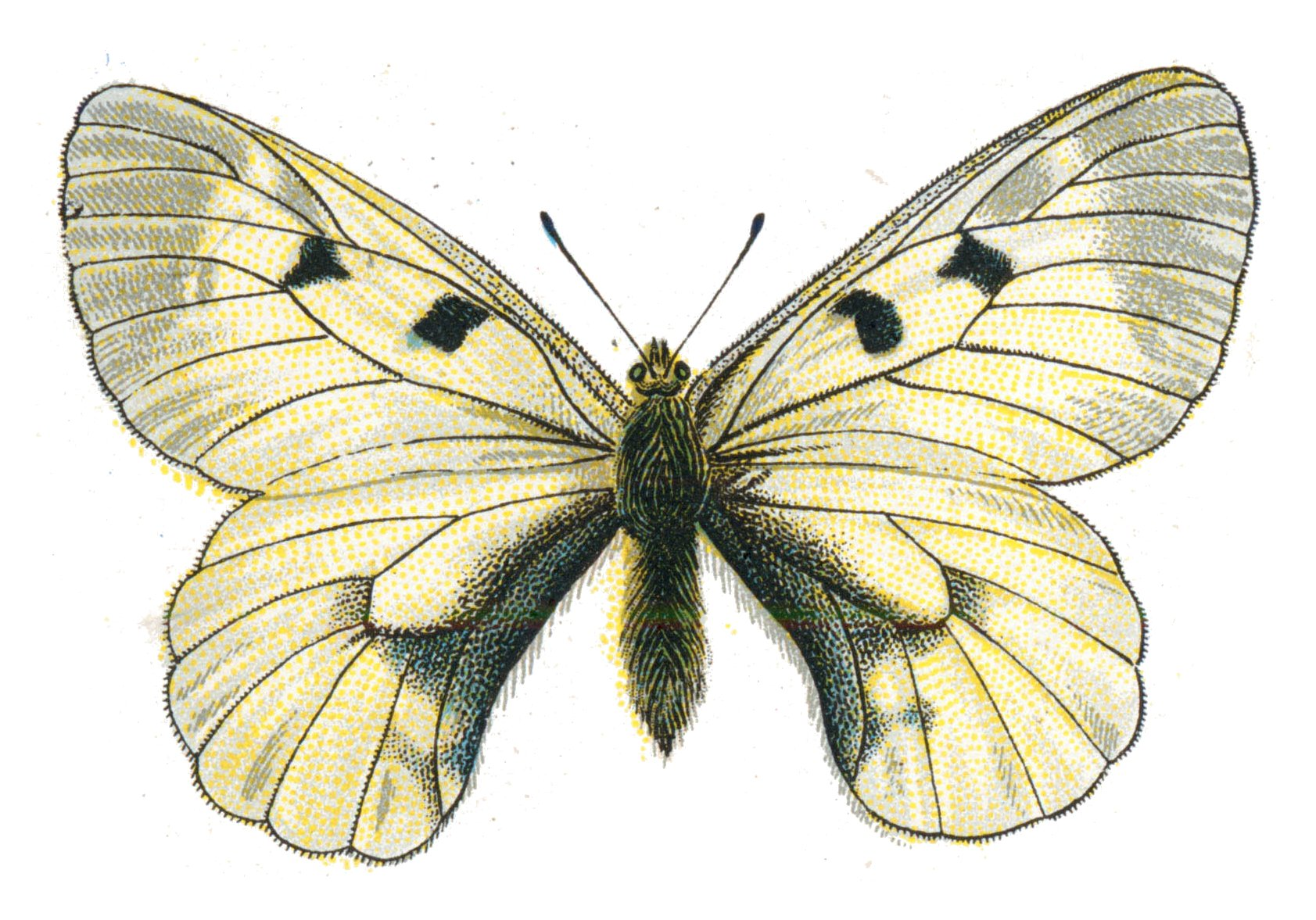 Parnassius mnemosyne